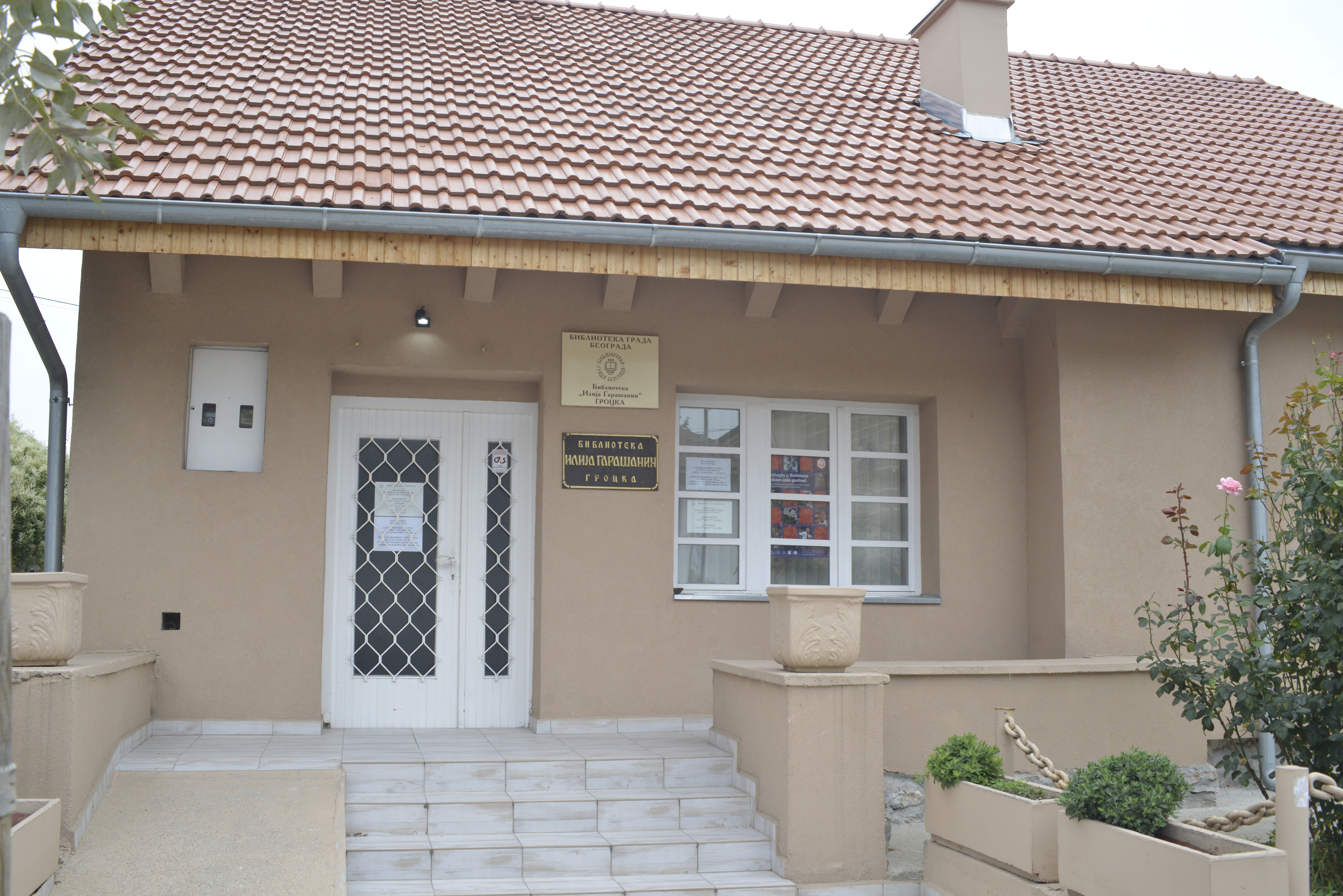 Biblioteka "Ilija Garašanin" u Grockoj - Restaurirana zgrada biblioteke u Gročanskoj čaršiji